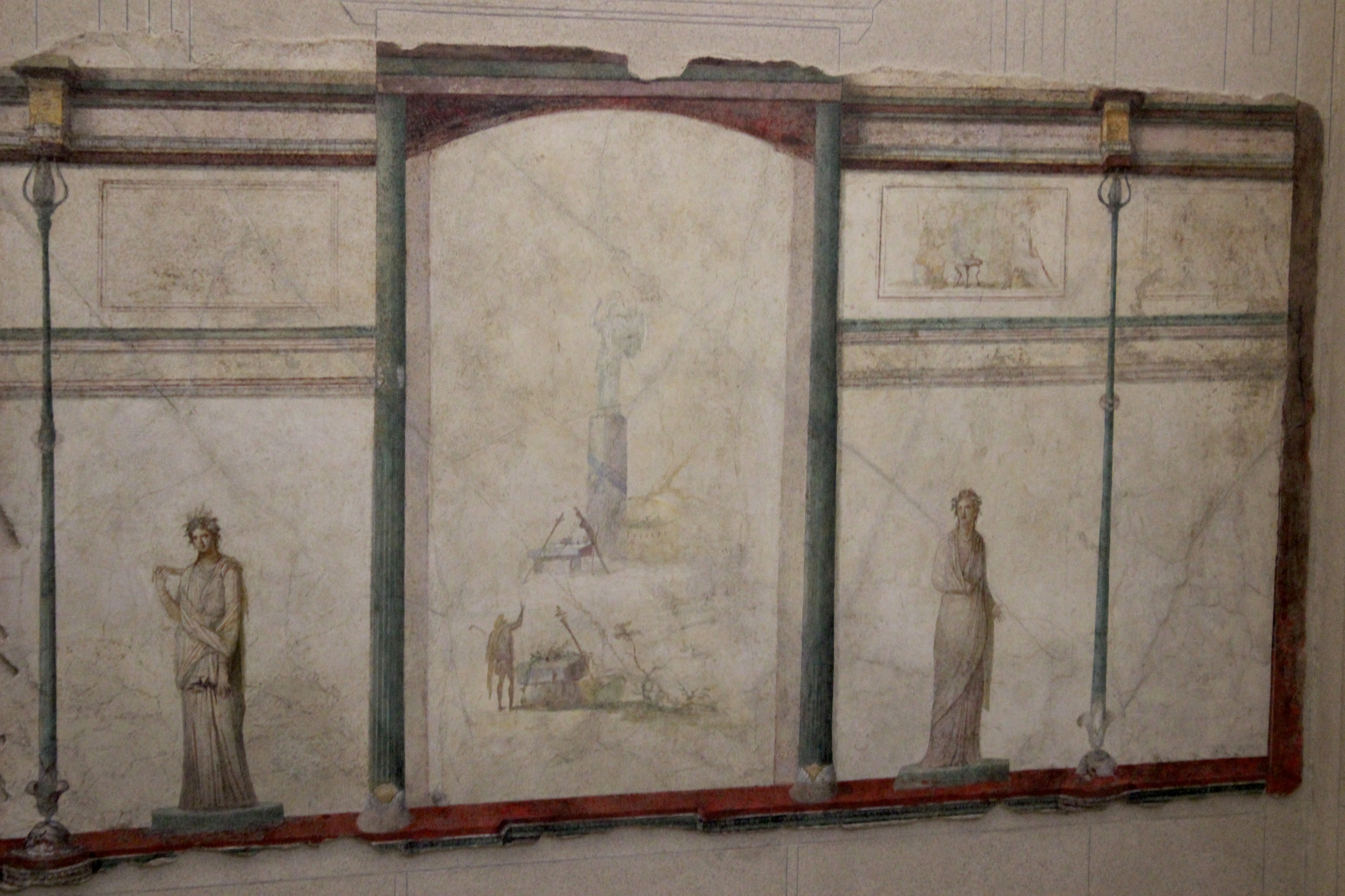 Palazzo Massimo alle Terme. Frescos de la Casa de la Farnesina.